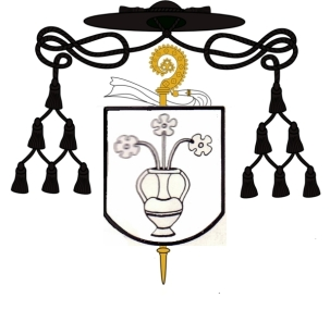 Wappen Johannes V. Cruck, 1555/56 - 1613, Abt von Münsterschwarzach (1598-1613)